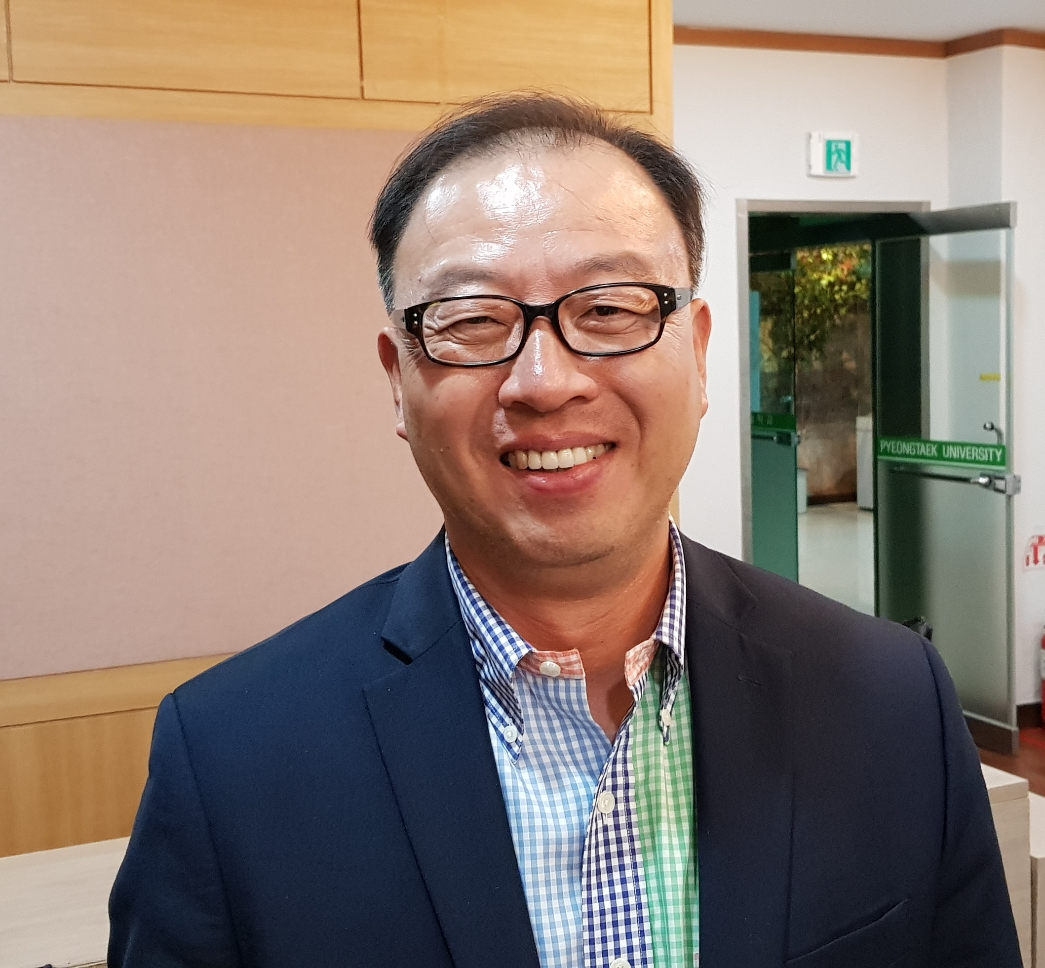 밴더빌트 대학교의 임창하 교수, 평택대학교, 2018년 5월 21일